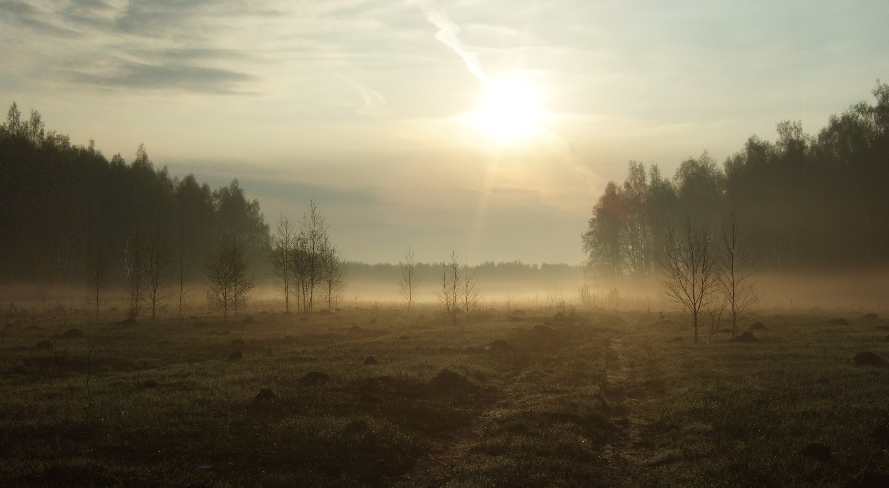 восход